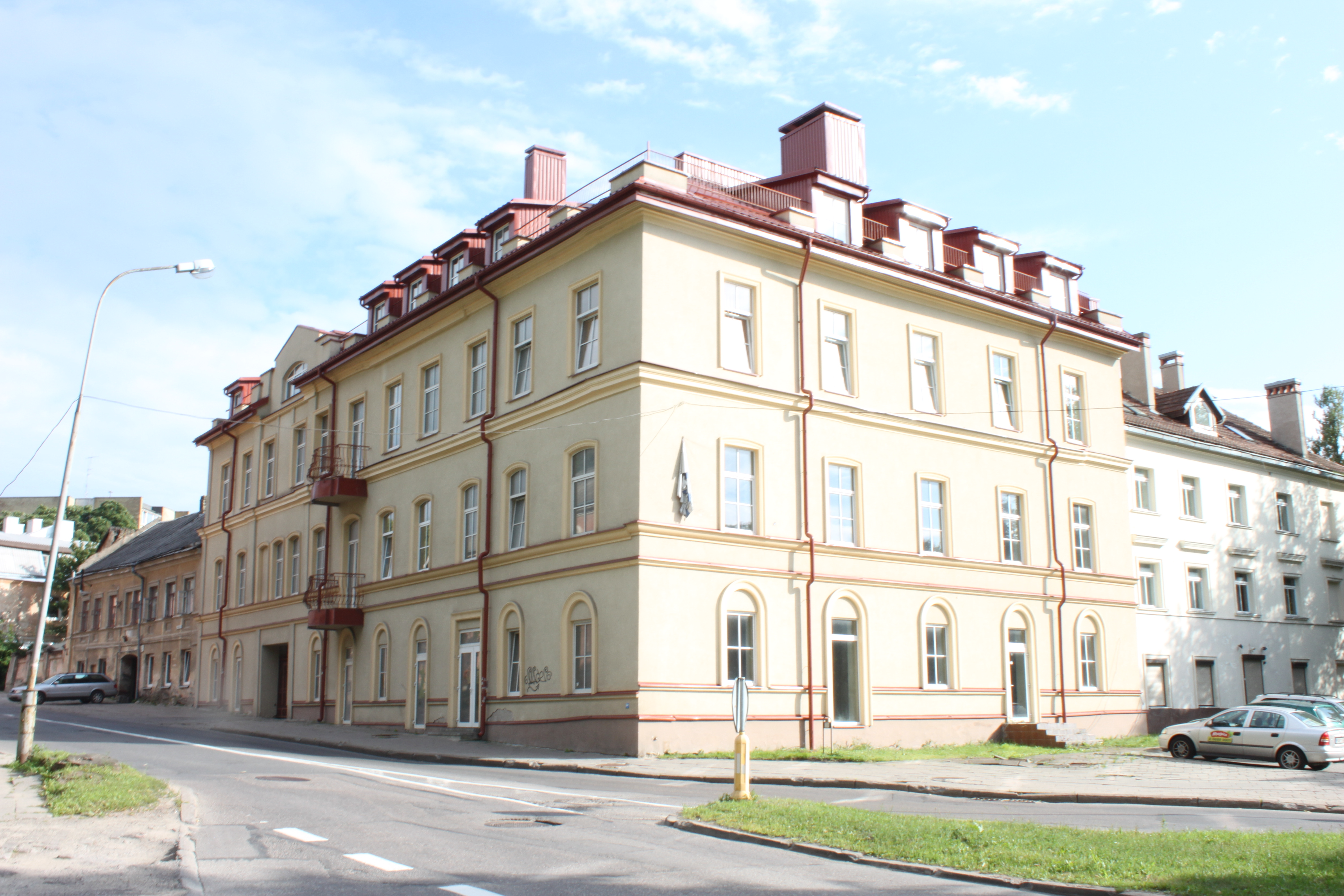 Liepkalnio gatvė, Vilnius